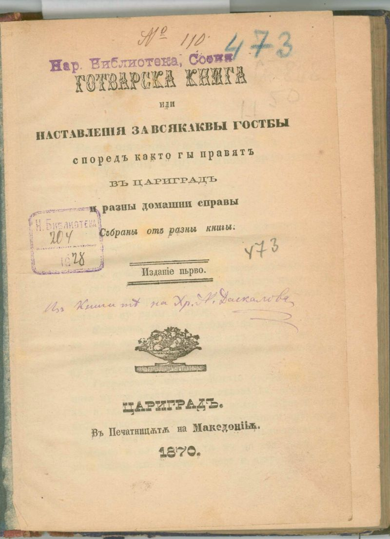 Началната страница на първата готварска книга на български език „Готварска книга или поставления за всякакви гостби, според както ги правят в Цариград“, написана от Петко Славейков и публикувана в 1870 година в печатница „Македония“ в Цариград.